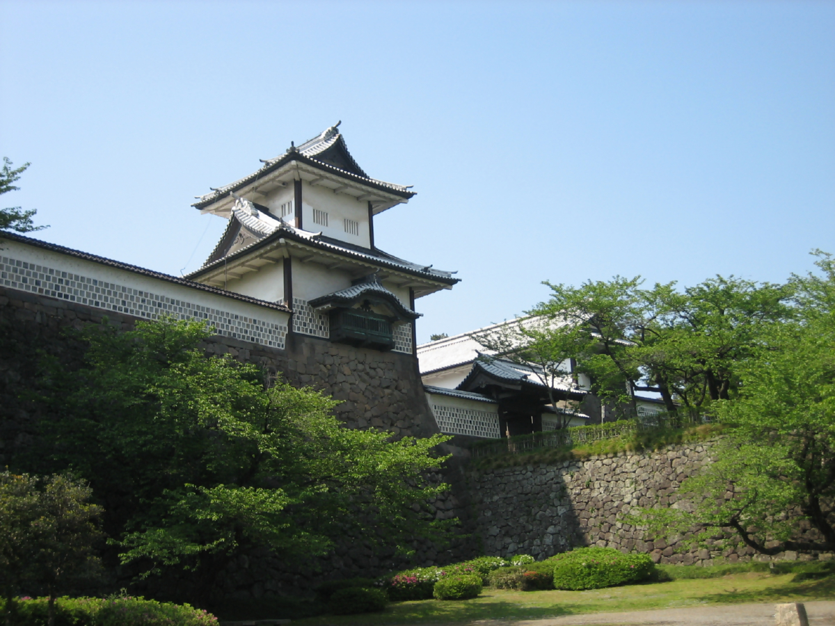 Kanazawa Castle Isikawa-mon. Kanazawa, Ishikawa Prefecture, Japan. 金沢城石川門